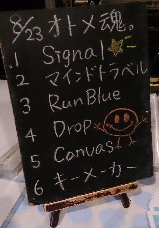 amiinaセトリボード(20150823(1))